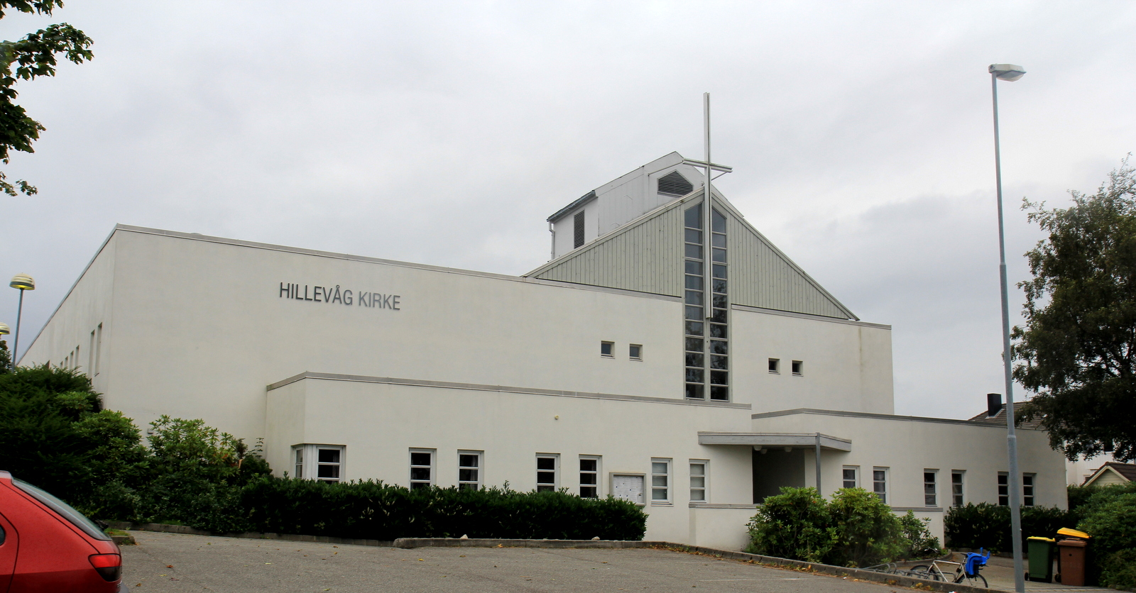 Hillevaag kirke, Hillevaag kirkested